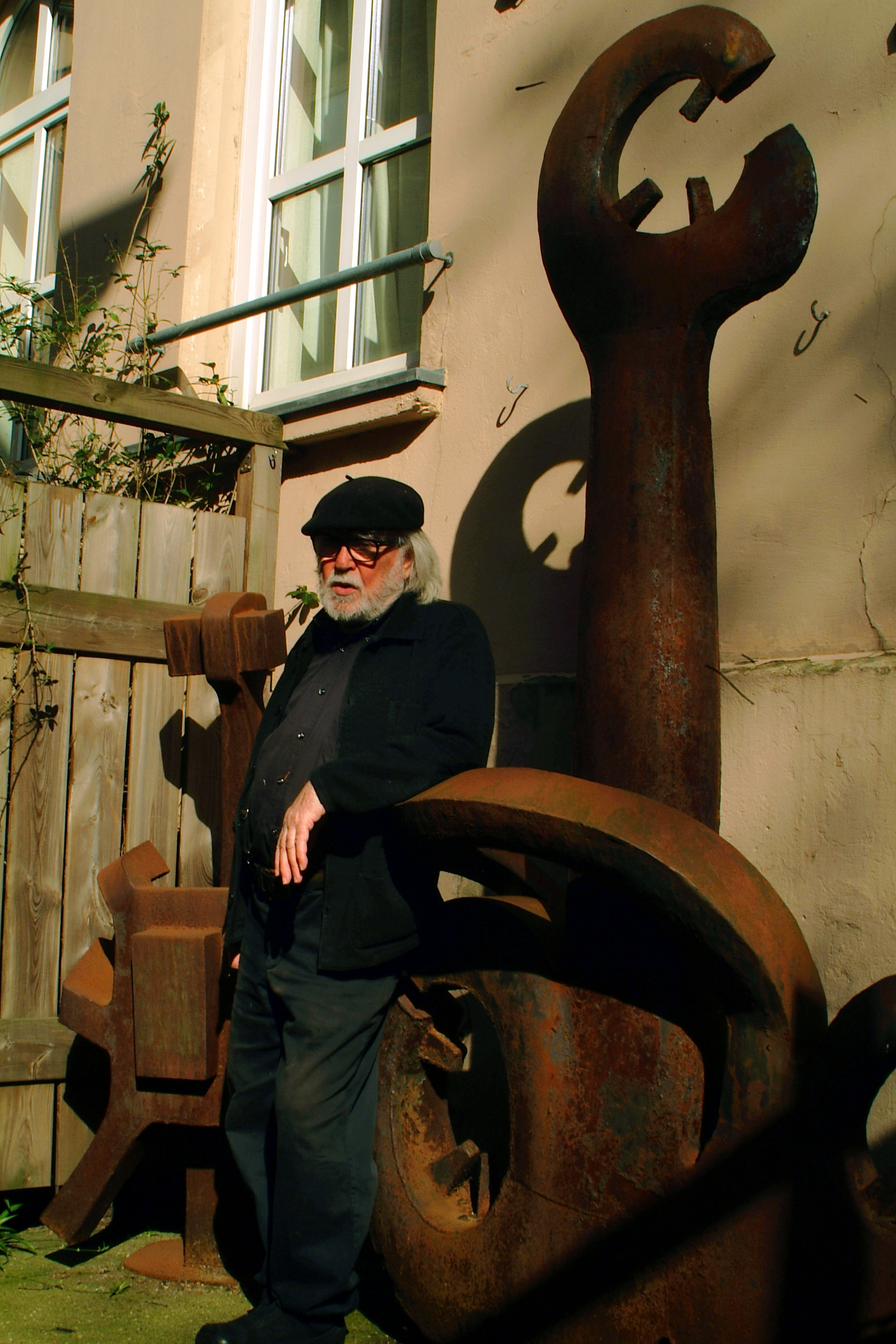 Jorge La Guardia, Ganzkörperportrait an seiner Plastik Der Schrei (span.:El grito) von 1975 lehnend im Hof seines Ateliers.